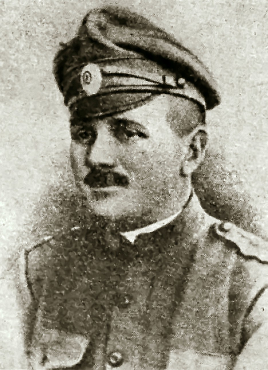 Jan Gayer (1885-1918)